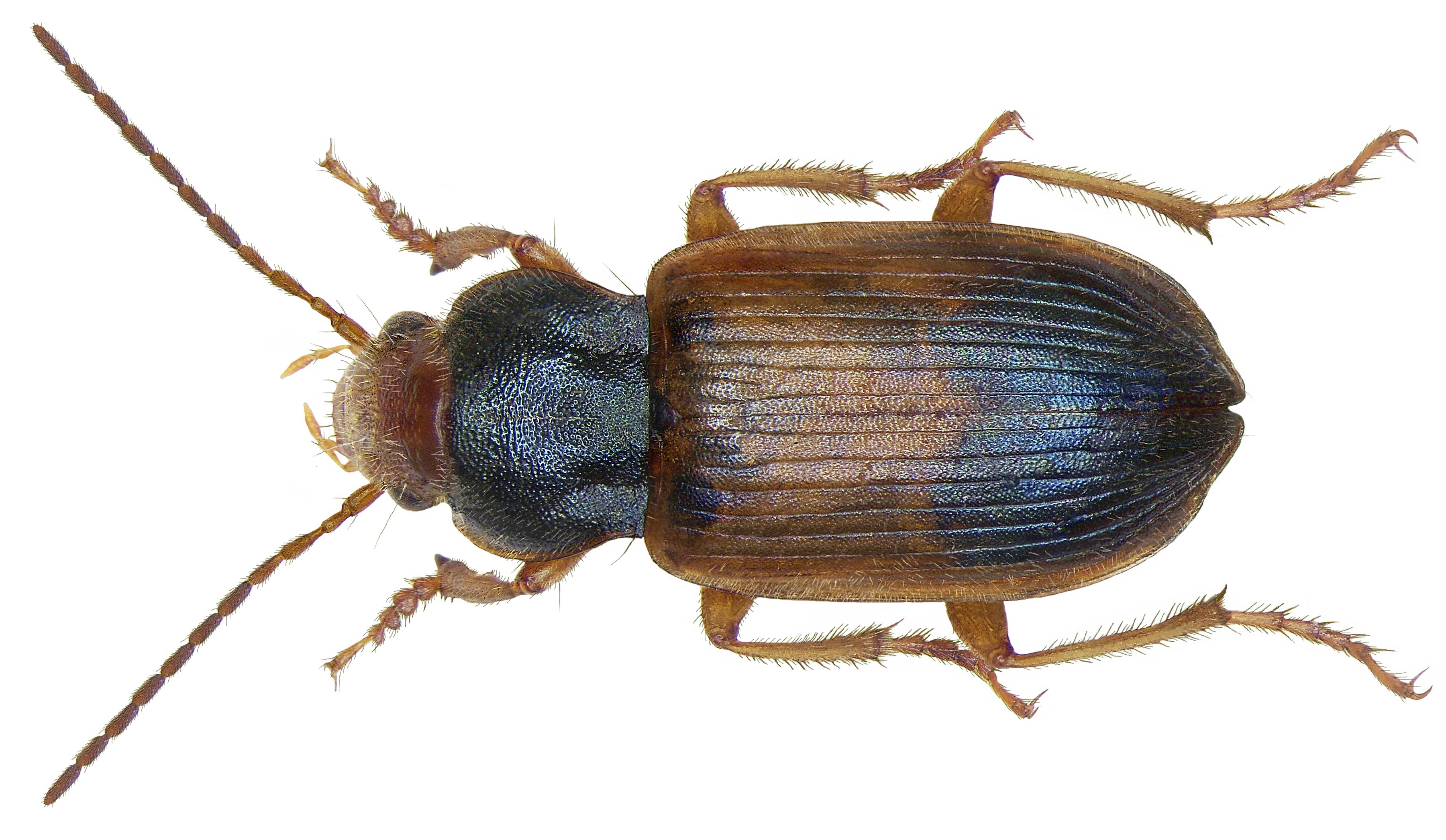 Familie: Carabidae Größe: 7,4-9,5 mm Verbreitung: Europa, Nordwestafrika, Kleinasien, Kaukasus, Russland, Turkmenien Ökologie: in warmen Feuchtgebieten Fundort: Helvetia, Graibünden, Ilanz leg.det. U.Schmidt, 2004 Foto: U.Schmidt, 2008